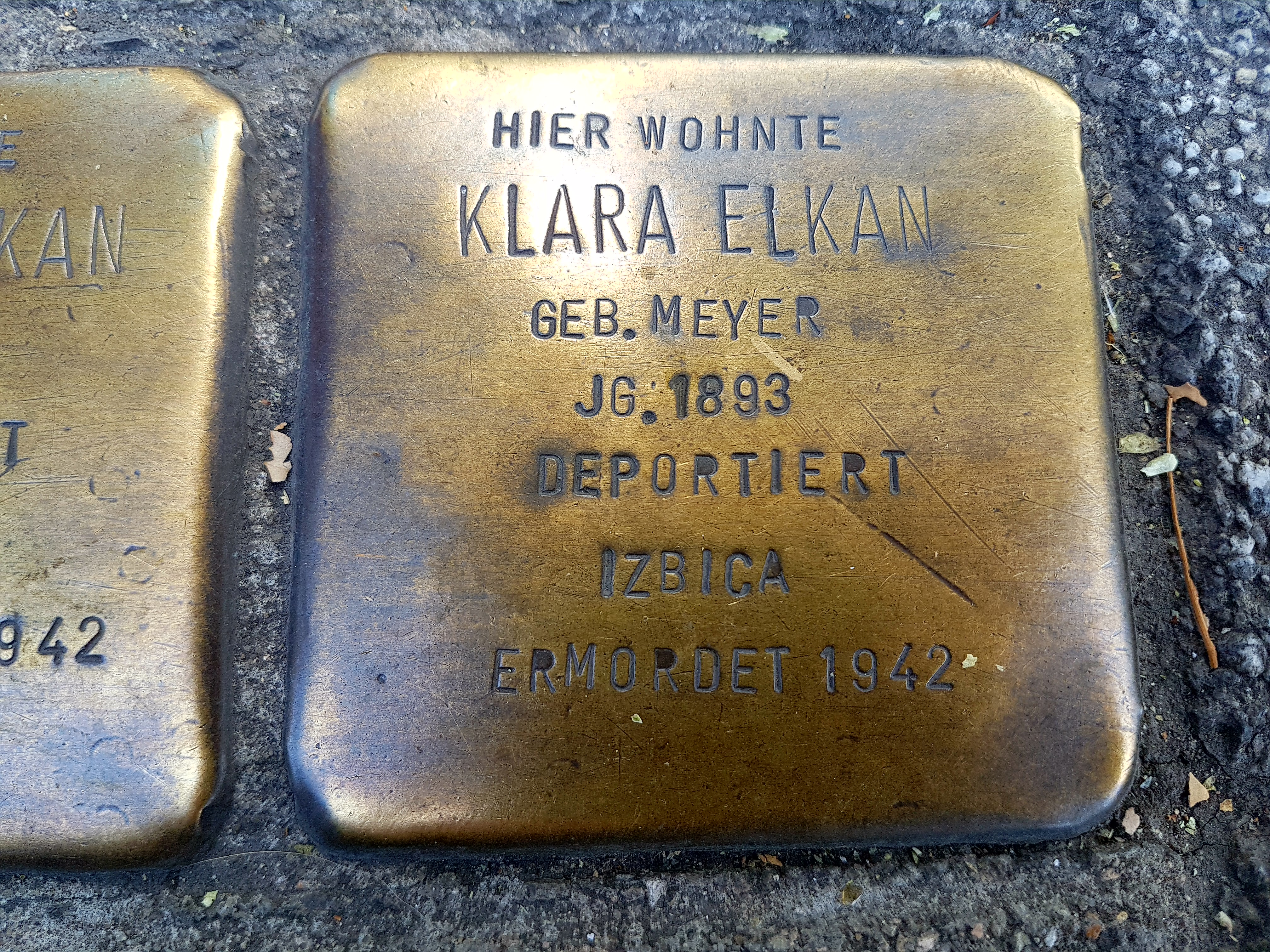 Klara Elkan Stolperstein Duisburg